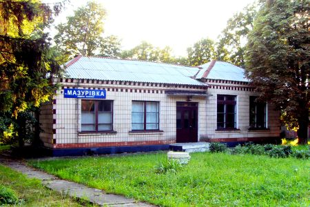 Вокзал станціїї Мазурівка